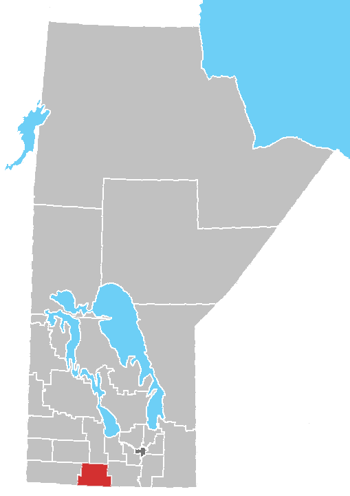 Manitoba census area No. 4